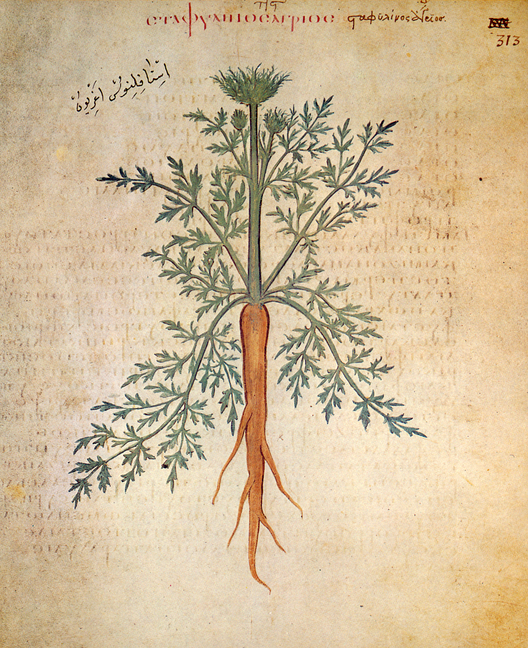 Pflanzenbild der Möhre (Daucus silvestris L., Fam. Umbelliferae) im Wiener Dioskurides, Blatt 313 recto